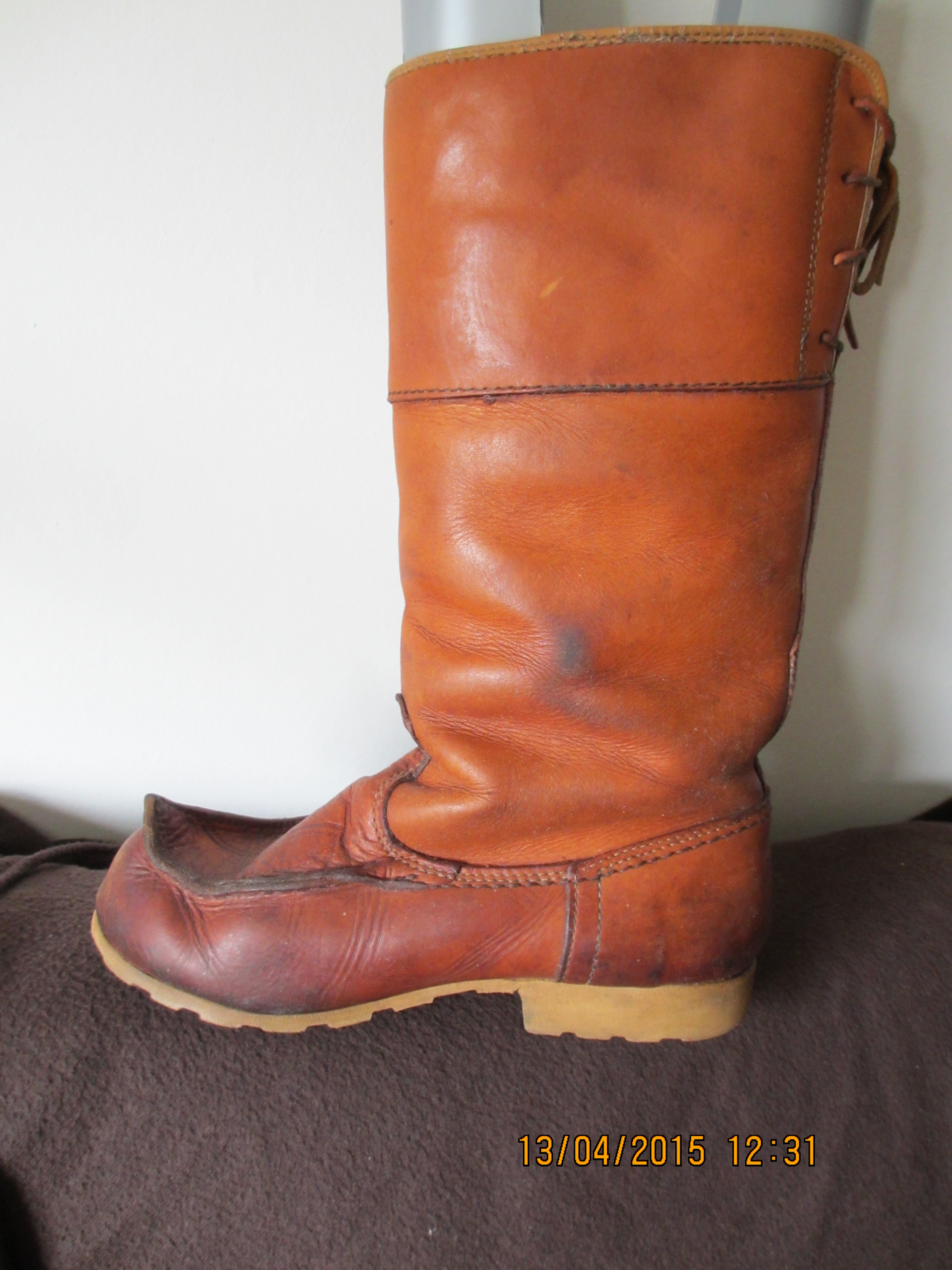 Inköpt ca 1976